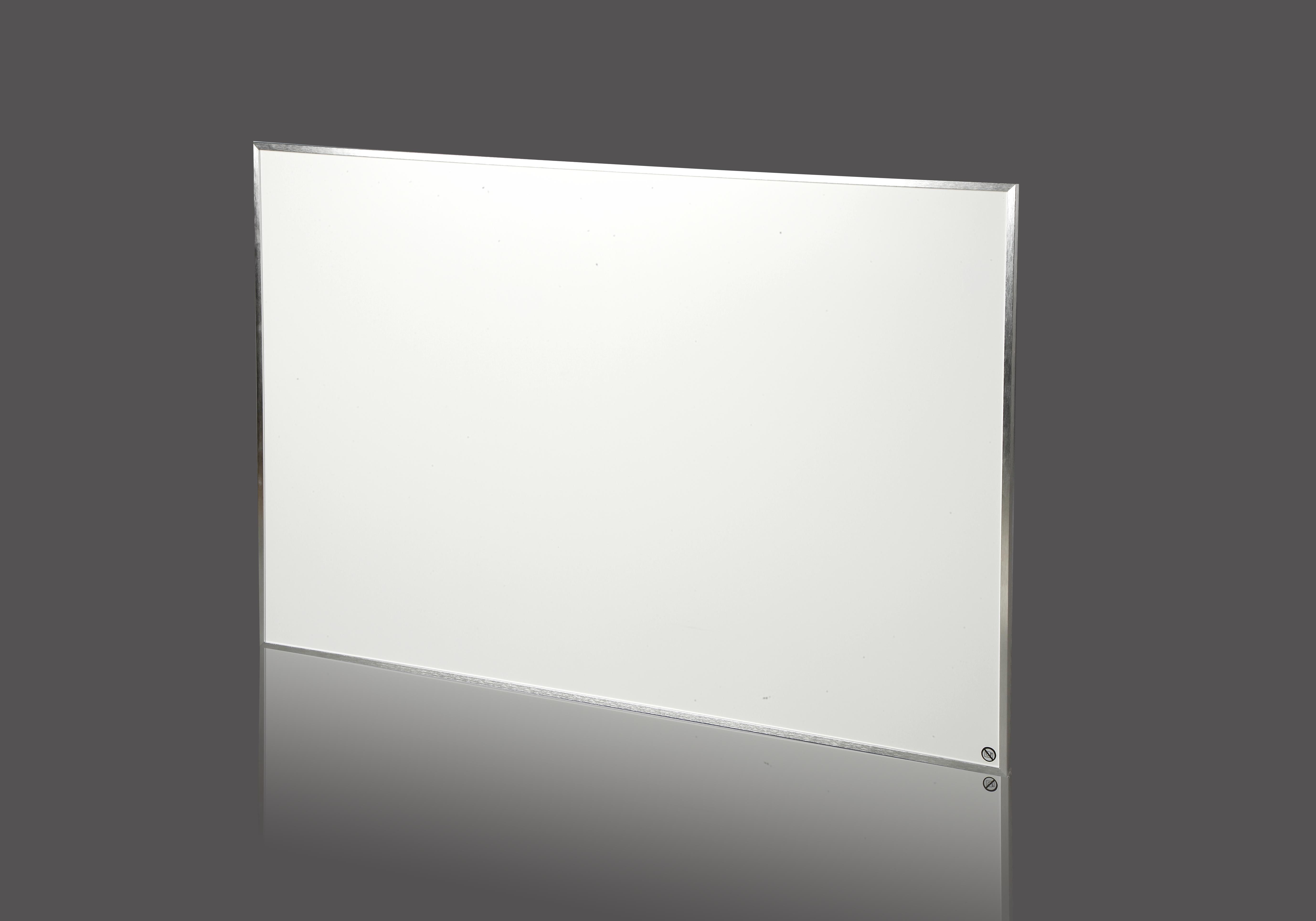 Radiateur infrarouge Dim.: 900 * 600 * 25 mm, Puissance 650 Watt, équivalent d'un radiateur conventionnel par convection de 900 Watt